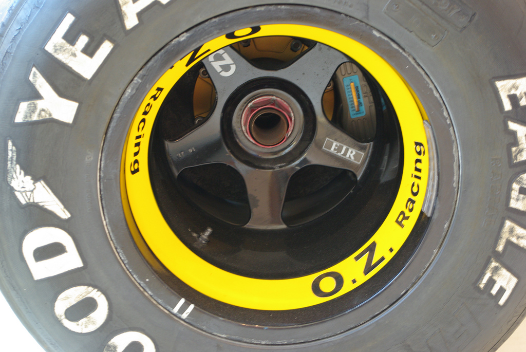 1991 Jordan F1 191 "Michael Schumacher" im Museum Prototyp Hamburg